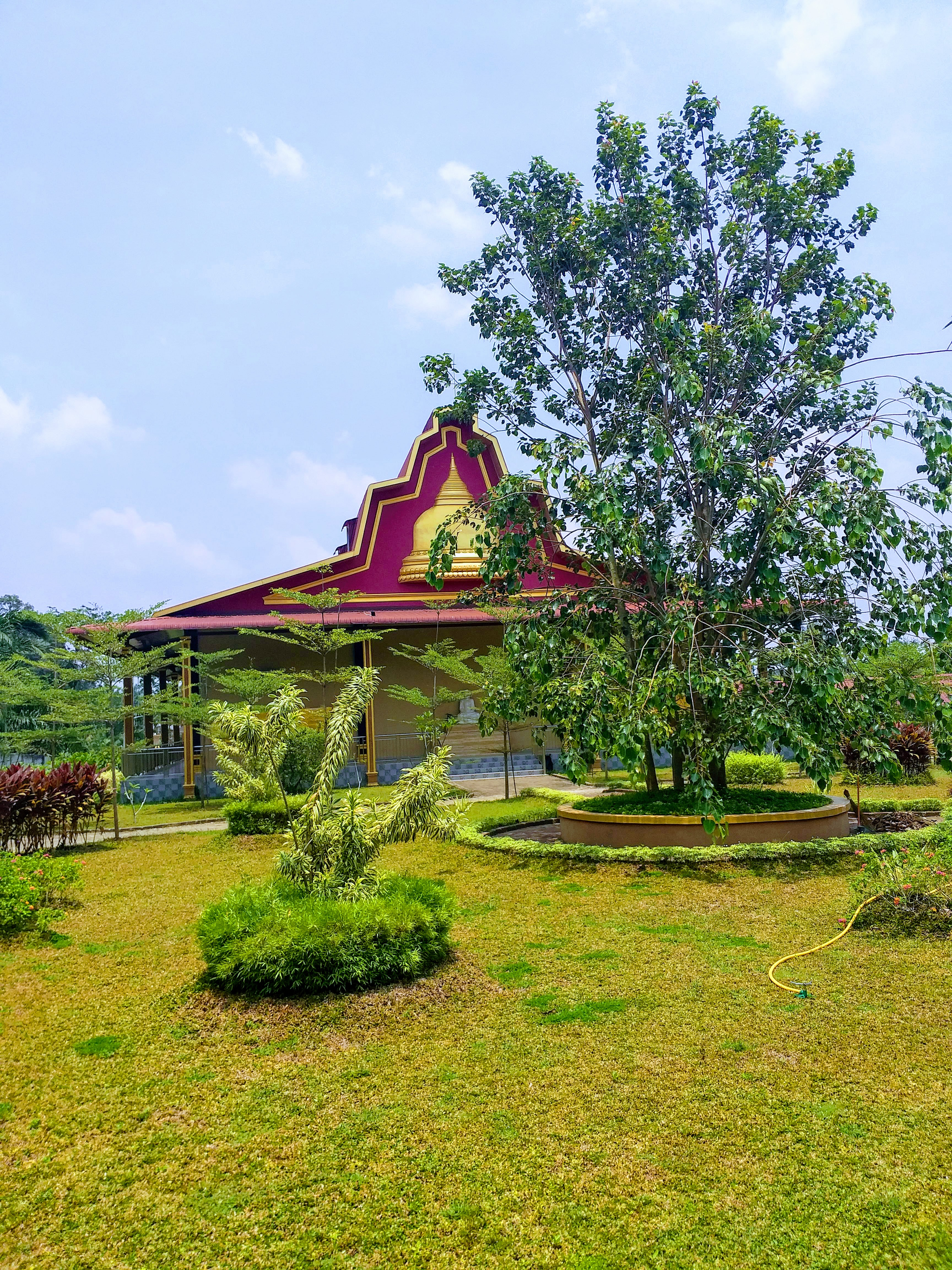 Taman Jetavana yang berlokasi di Namo Rambe, Kabupaten Deli Serdang, Sumatera Utara 20353 ini memiliki suasana yang asri dan damai, keberadaannya yang jauh dari kota membuat tempat ini cocok untuk bermeditasi maupun kegiatan lainnya. Tak kalah dengan fasilitas fasilitas yang ada, semua tertata rapi dan bersih.